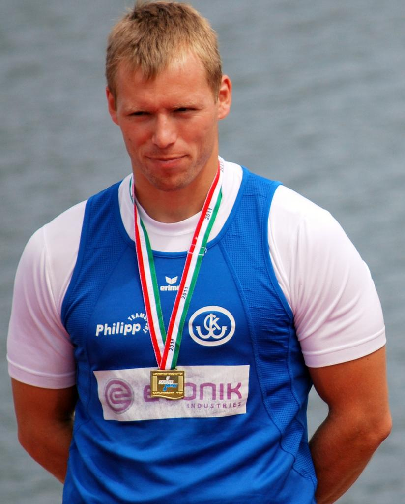 Matthias Ebhardt mit der Goldmedaille